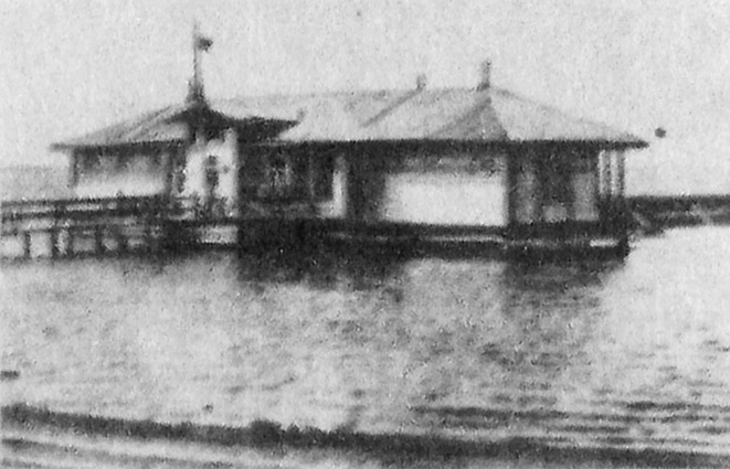 грязелечебницаа "Мойнаки". Озеро Мойнаки. Конец XIX в.